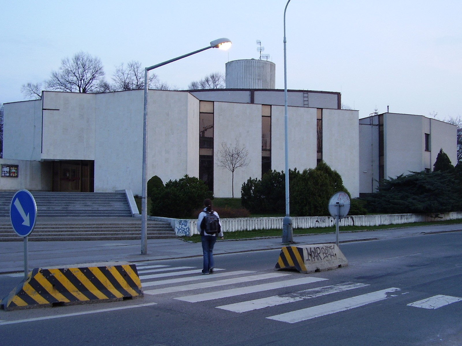 Modlitebna Církve Adventistů sedmého dne v Praze na Smíchově, na Peroutkově ulici